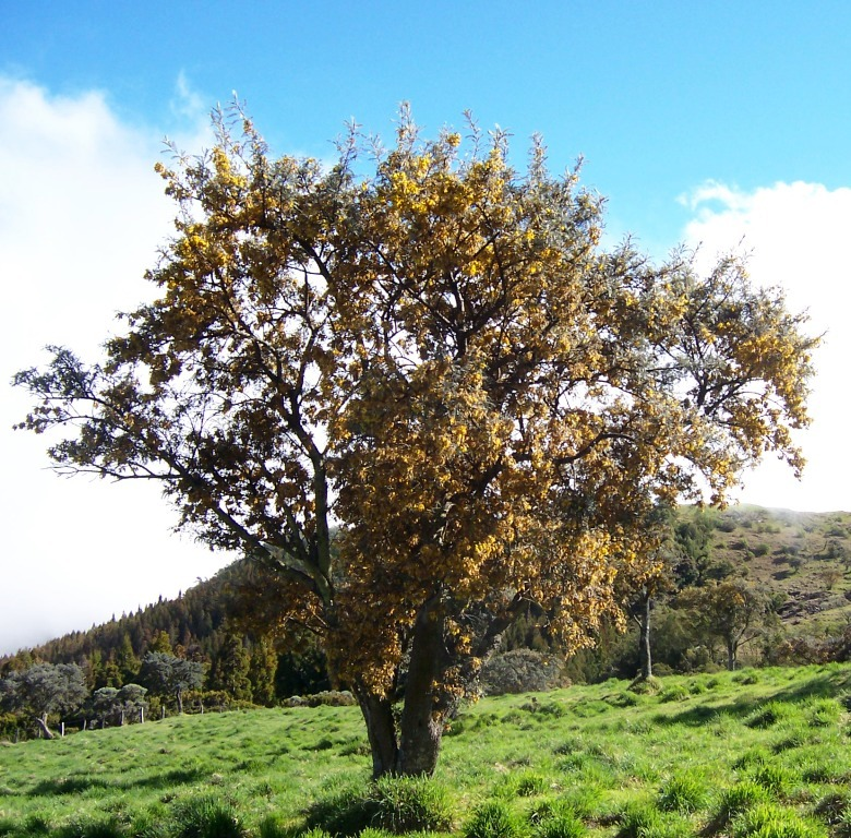 fr: Petit tamarin des hauts (Sophora denudata) - Allure générale d'un arbre en fleur dans les pâturages de la Plaine des Cafres (Ile de la Réunion) en: Little Réunion mountain tamarin (Sophora denudata) - Tree in blossom in the meadows of la Plaine des Cafres (Réunion island) Photo: B.navez - 01 SEP 2005 - Réunion island